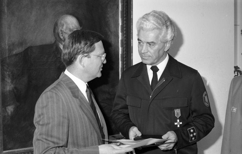 14.2.1989 Der Parlamentarische Staatssekretär beim Bundesminister des Innern, Carl-Dieter Spranger (links), überreicht das Ehrenzeichen in Silber der Bundesanstalt THW an den Direktor der Brandschutzdirektion Frankfurt, Herrn Prof. Dipl-Ing. Ernst Achilles - im Bundesministerium des Innern.